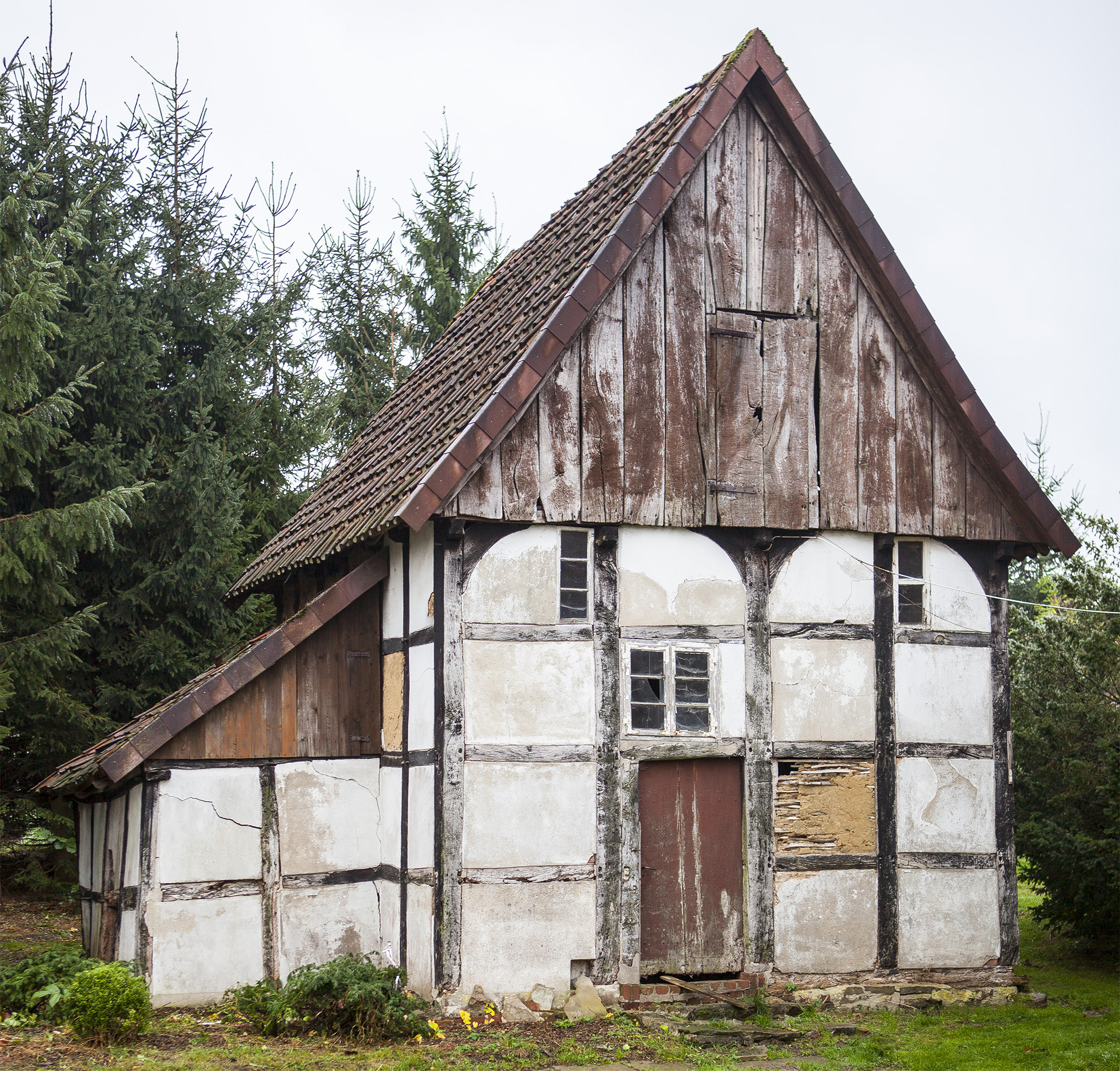 Bad Salzuflen-Wüsten, Kirchheider Str. 24This is a photograph of an architectural monument.